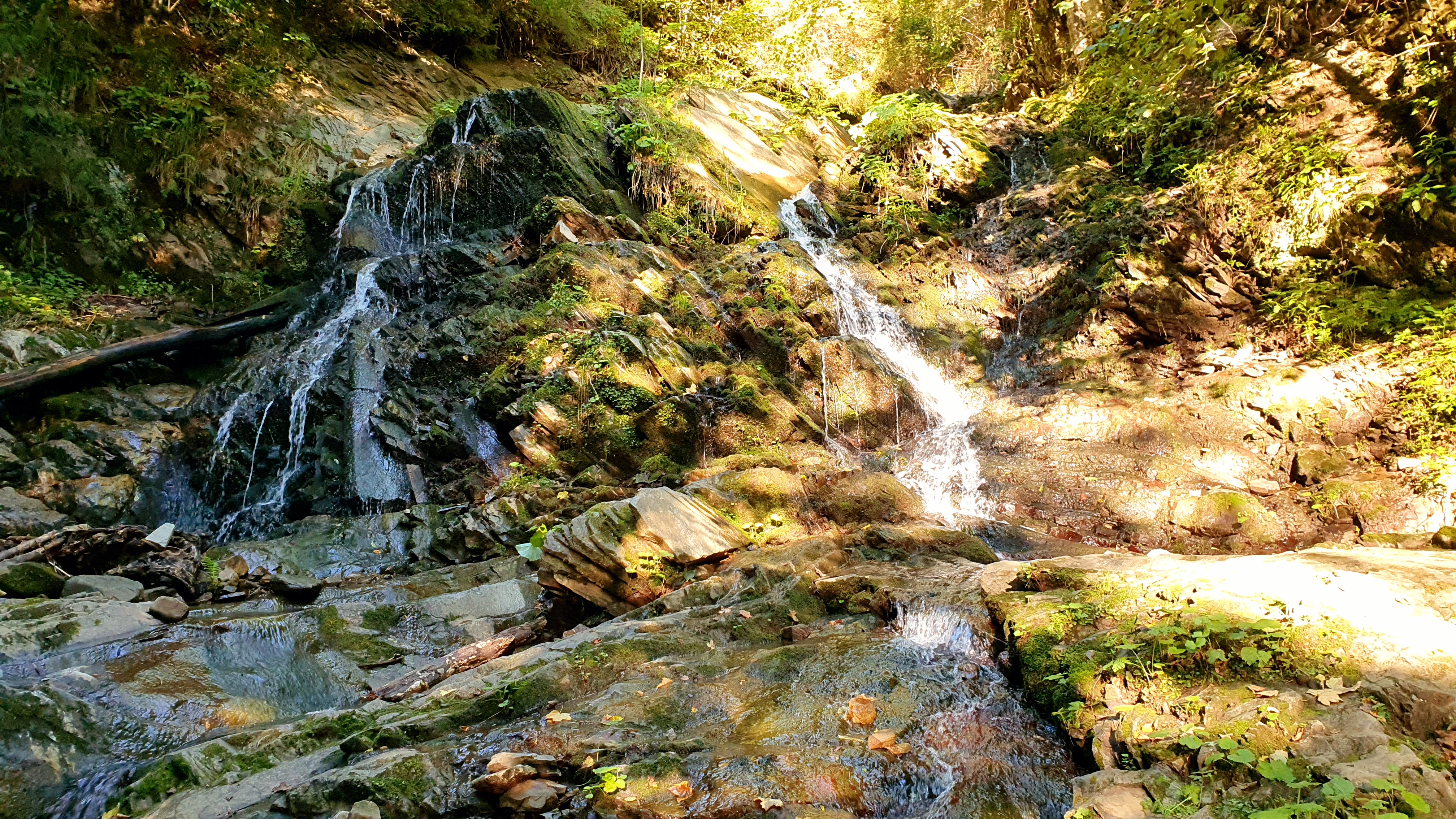 Сокільські водоспади (Яворівська Ніагара) розташовані в с. Яворів Косівського р-ну Івано-Франківської обл.